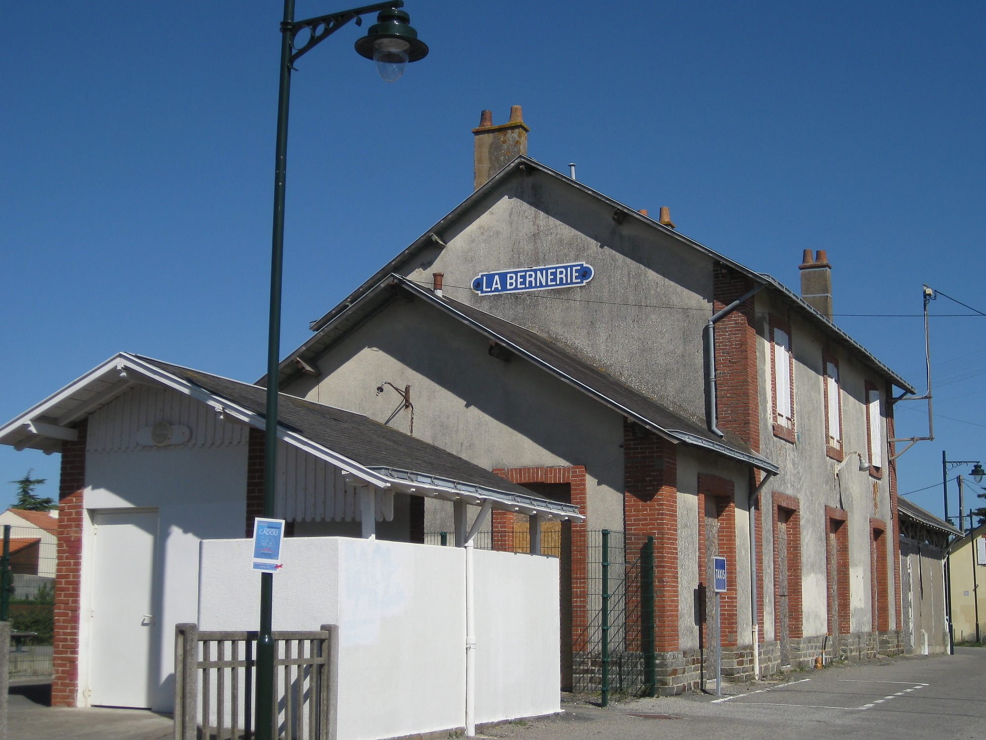 L'ancien bâtiment voyageurs de la gare de la Bernerie (44)